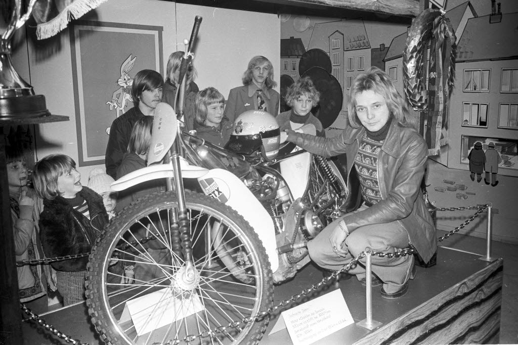 im Kaufhaus Karstadt. Der deutsche Meister im Sandbahn-Speedway- und Mannschaftsrennen gibt eine Autogrammstunde.